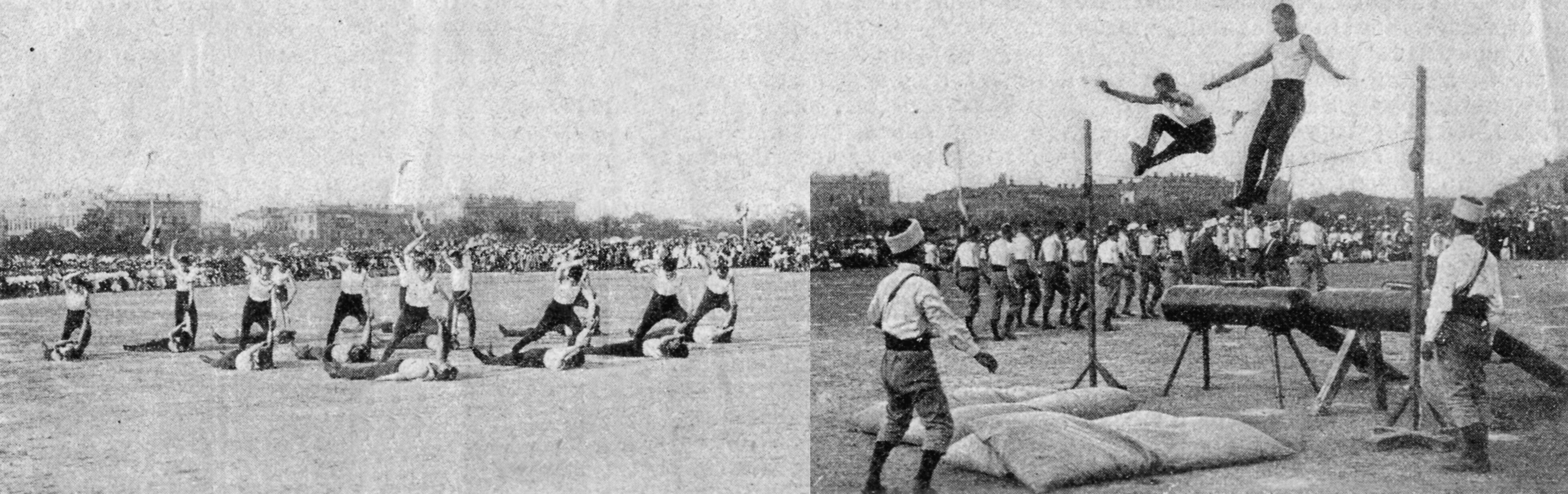 Болгарські військовики виконують показові гімнастичні вправи на Куликовому полі в Одесі